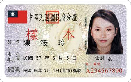 中華民國九十四年式國民身分證樣張正面。